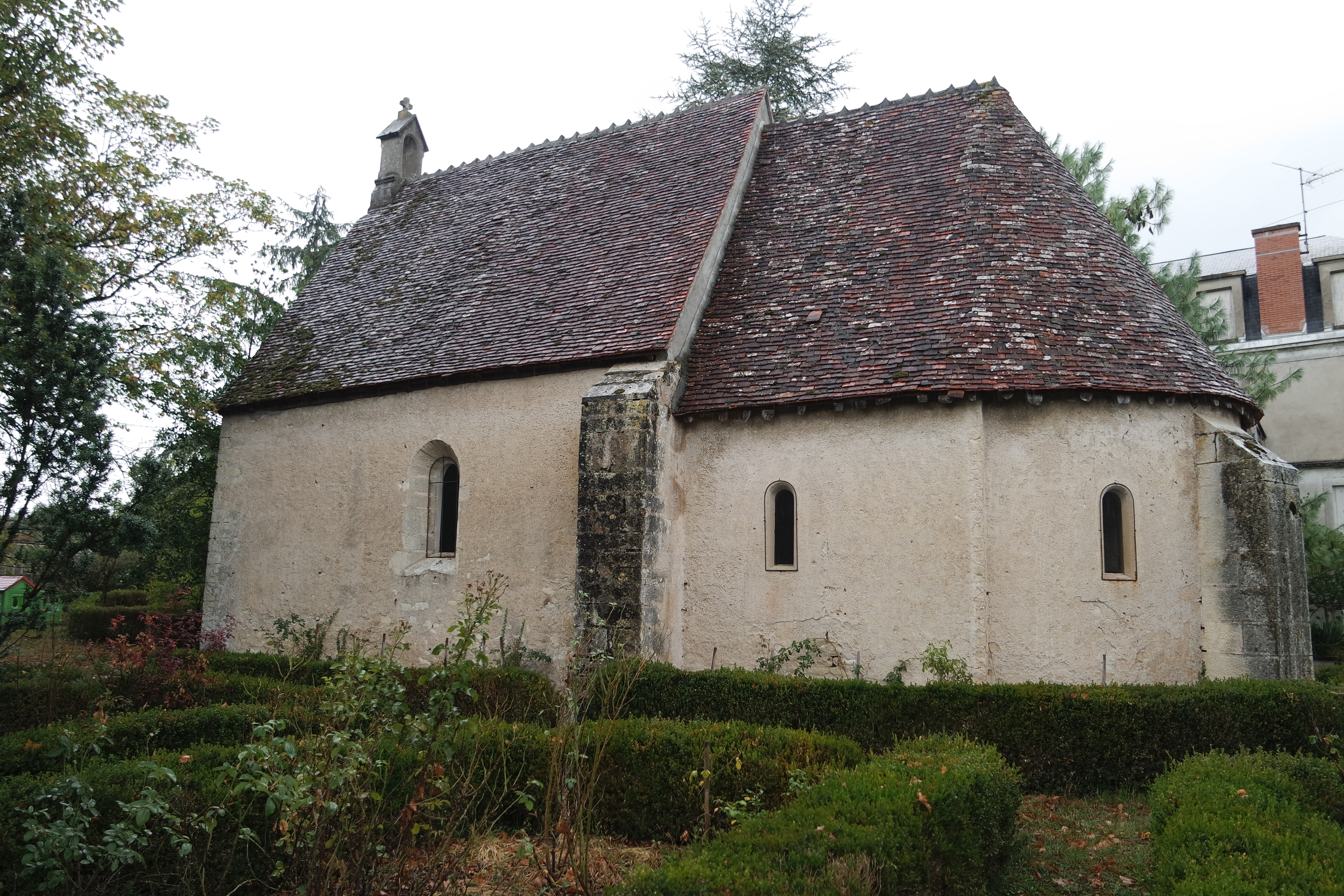 La chapelle Saint-Lazare, XIIe siècle, à Armes, Nièvre.